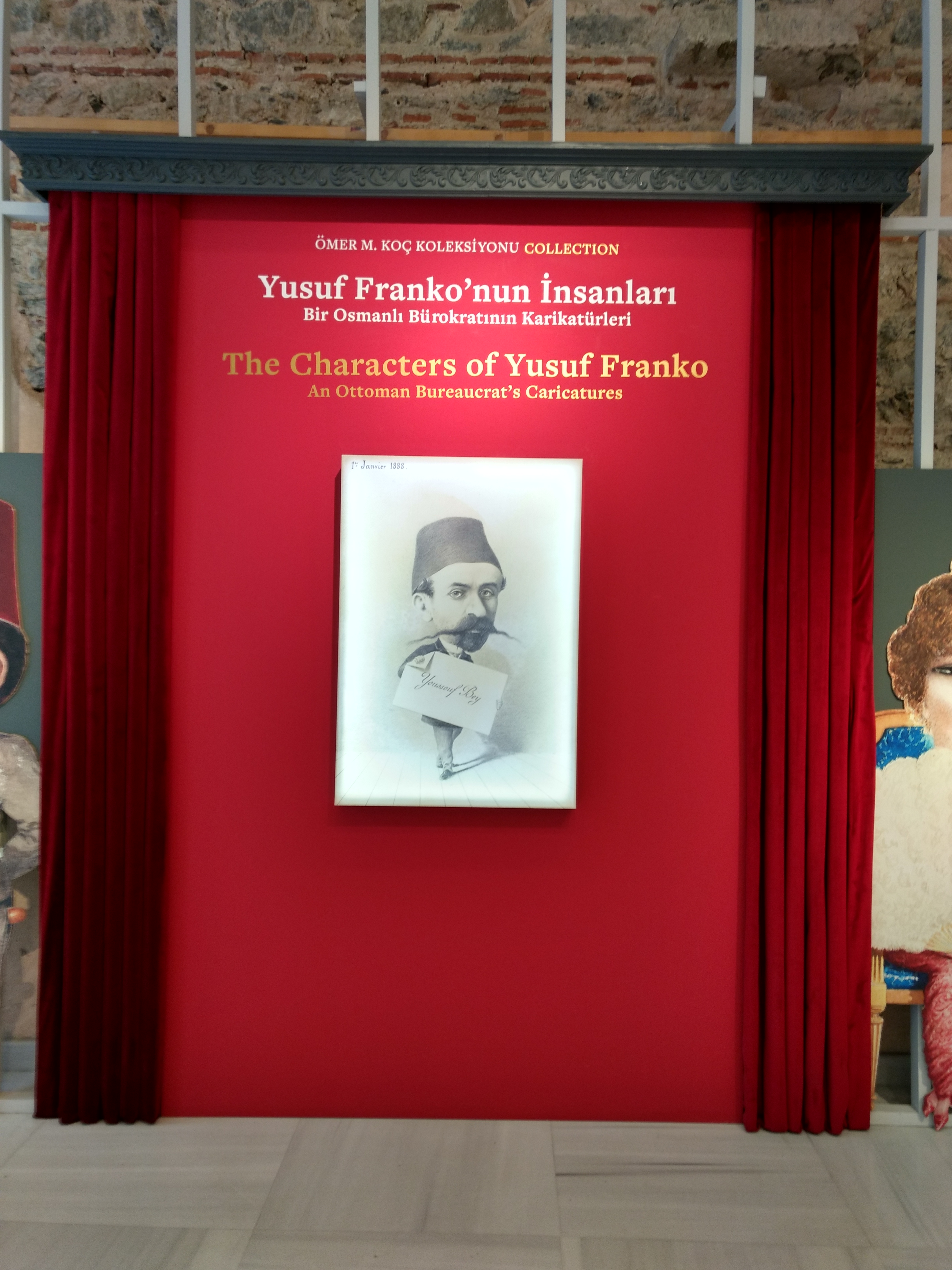 Koç Üniversitesi Anadolu Medeniyetleri Araştırma Merkezi'nde 26 Ocak 2017 - 1 Haziran 2017 tarihleri arasında "Yusuf Franko'nun İnsanları: Bir Osmanlı Bürokratının Karikatürleri" adıyla Yusuf Franko'nun karikatürleri sergilenmiştir.